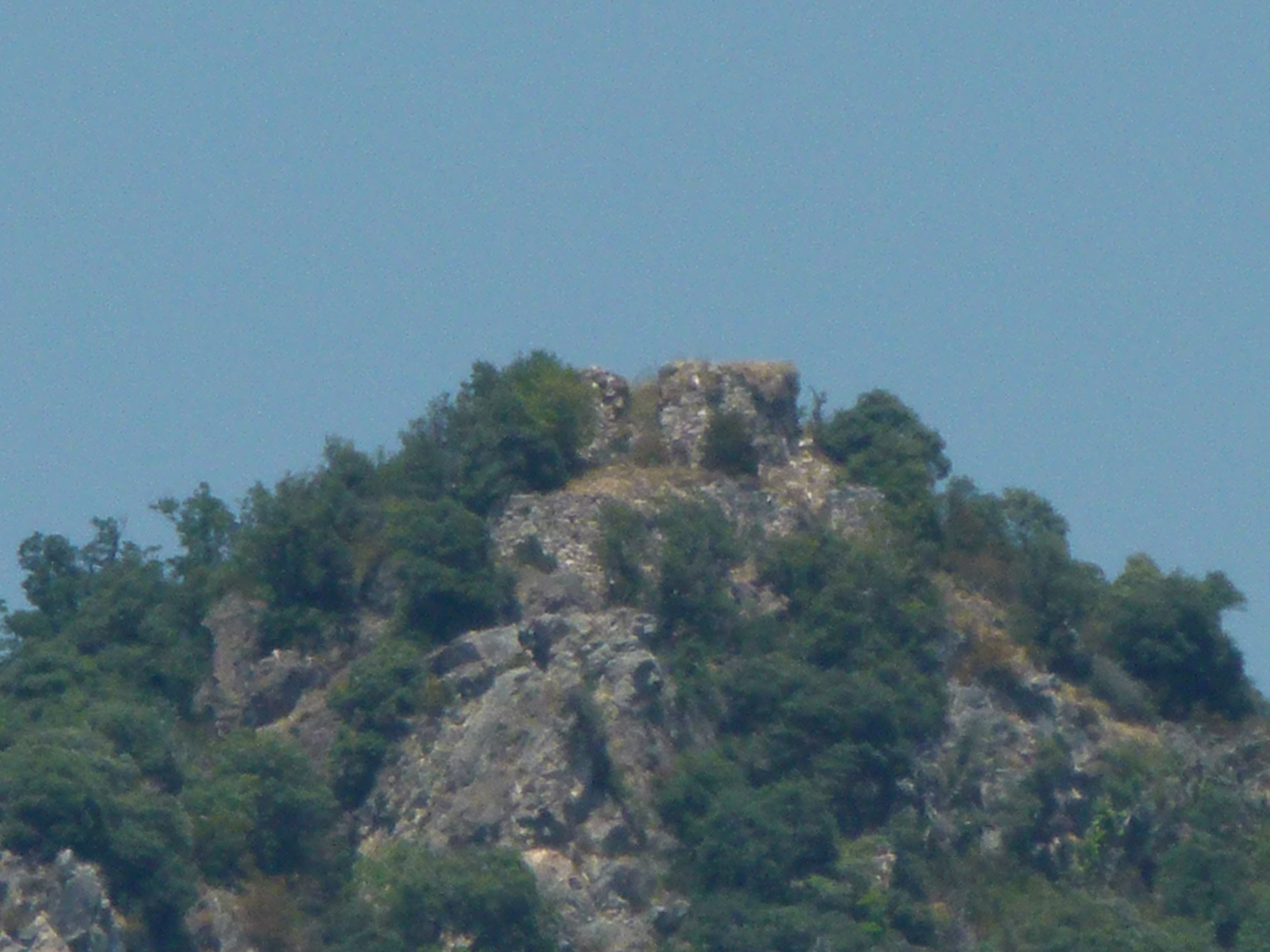 Torre de Coç des de Serrallonga - amb zoom forçat per veure els detalls de les restes